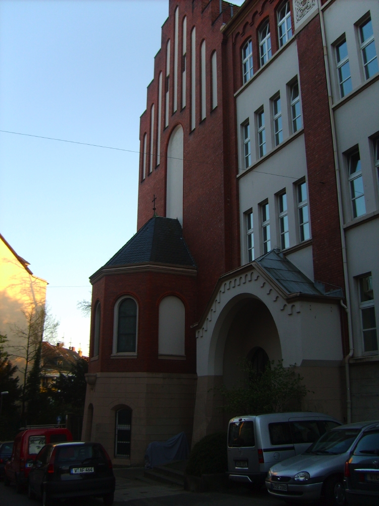 Kapelle der Sankt-Anna-Schule, Wuppertal-Elberfeld, Germany